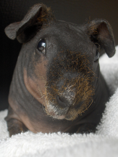 Een goudagouti skinny pig.